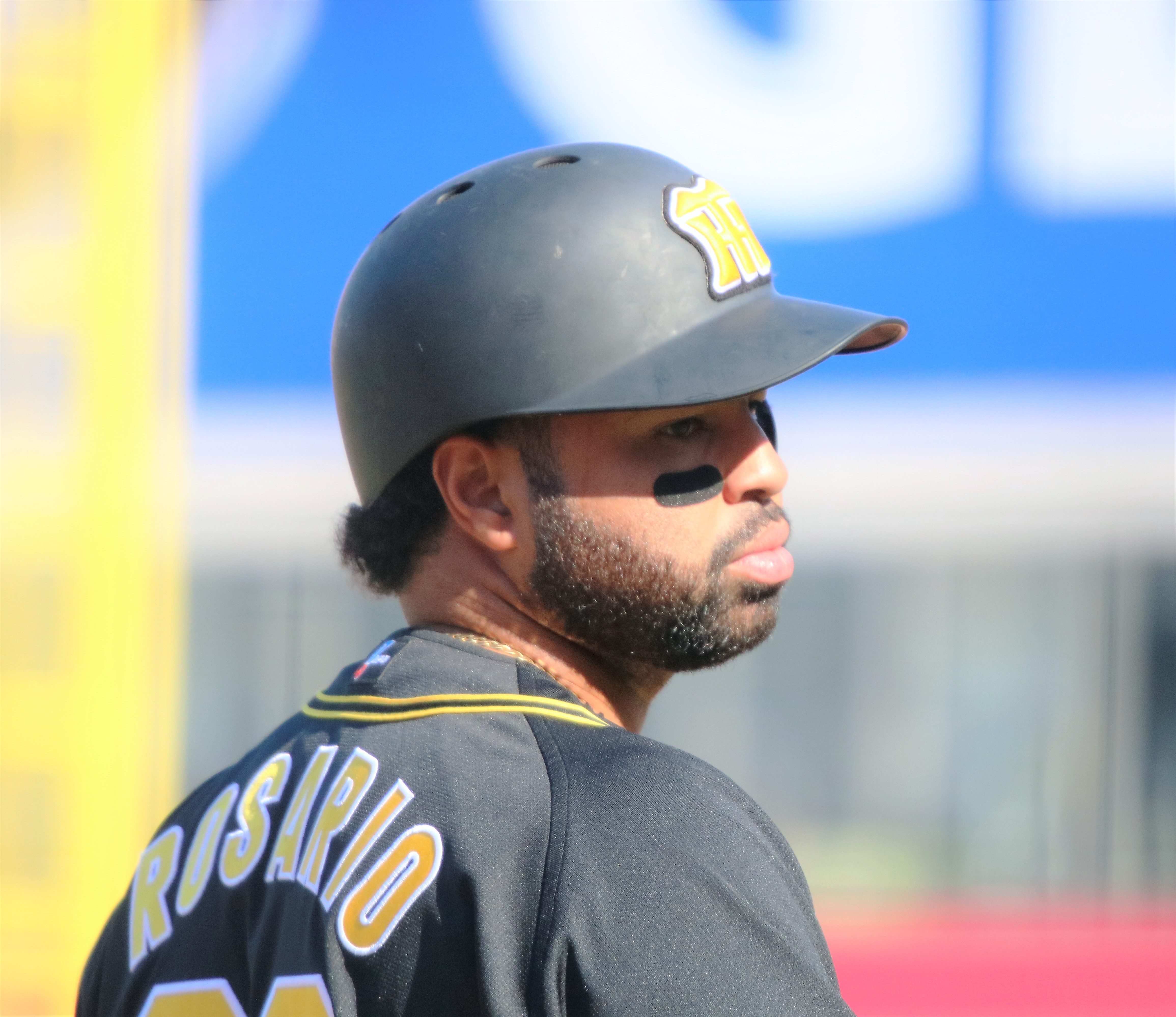 2018年5月12日 マツダスタジアム